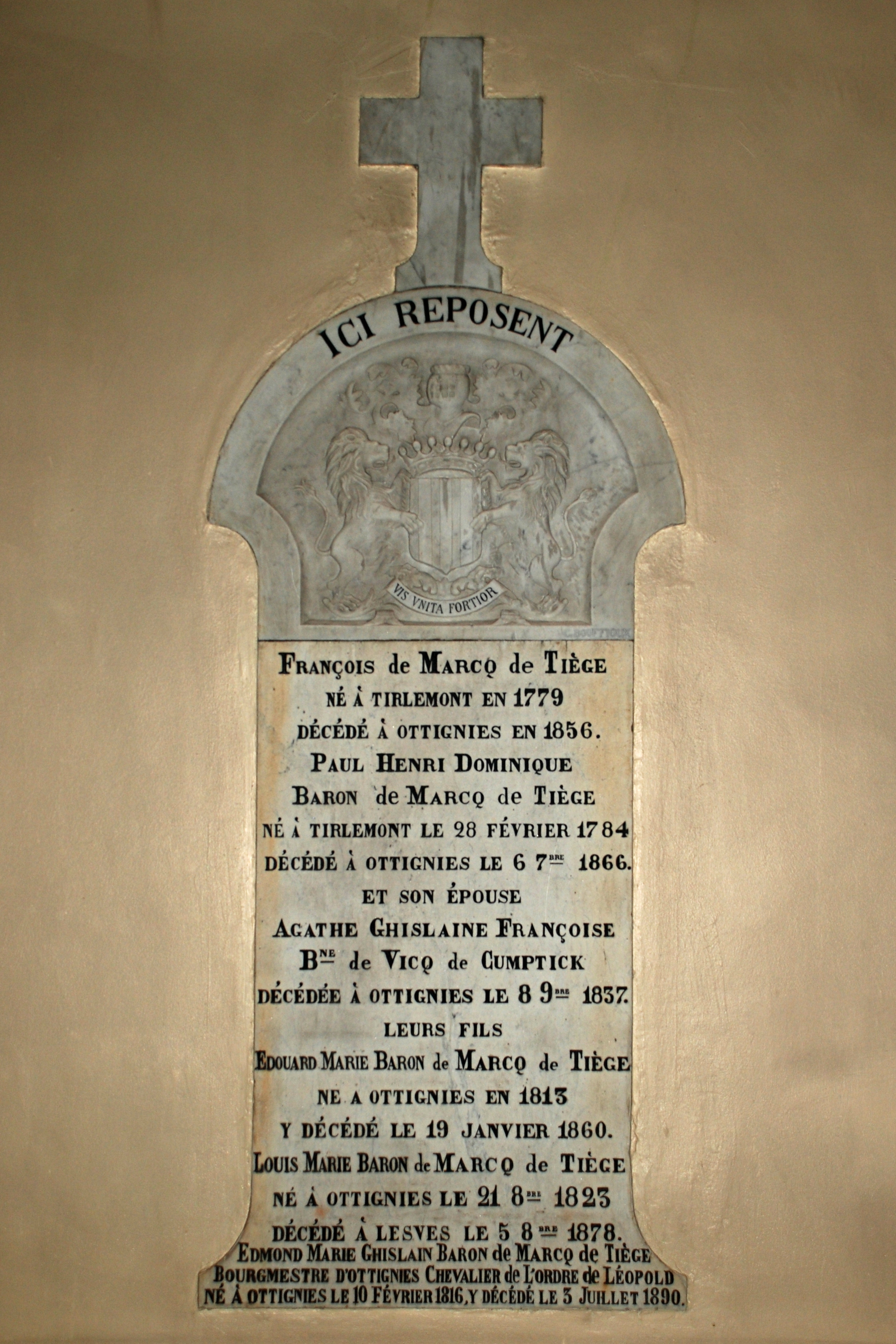 Belgique - Brabant wallon - Ottignies - église Saint-Rémi